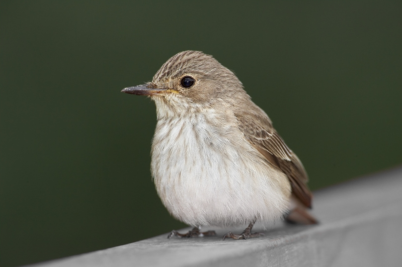 Muscicapa striata, Litovelské pomoraví, CZ